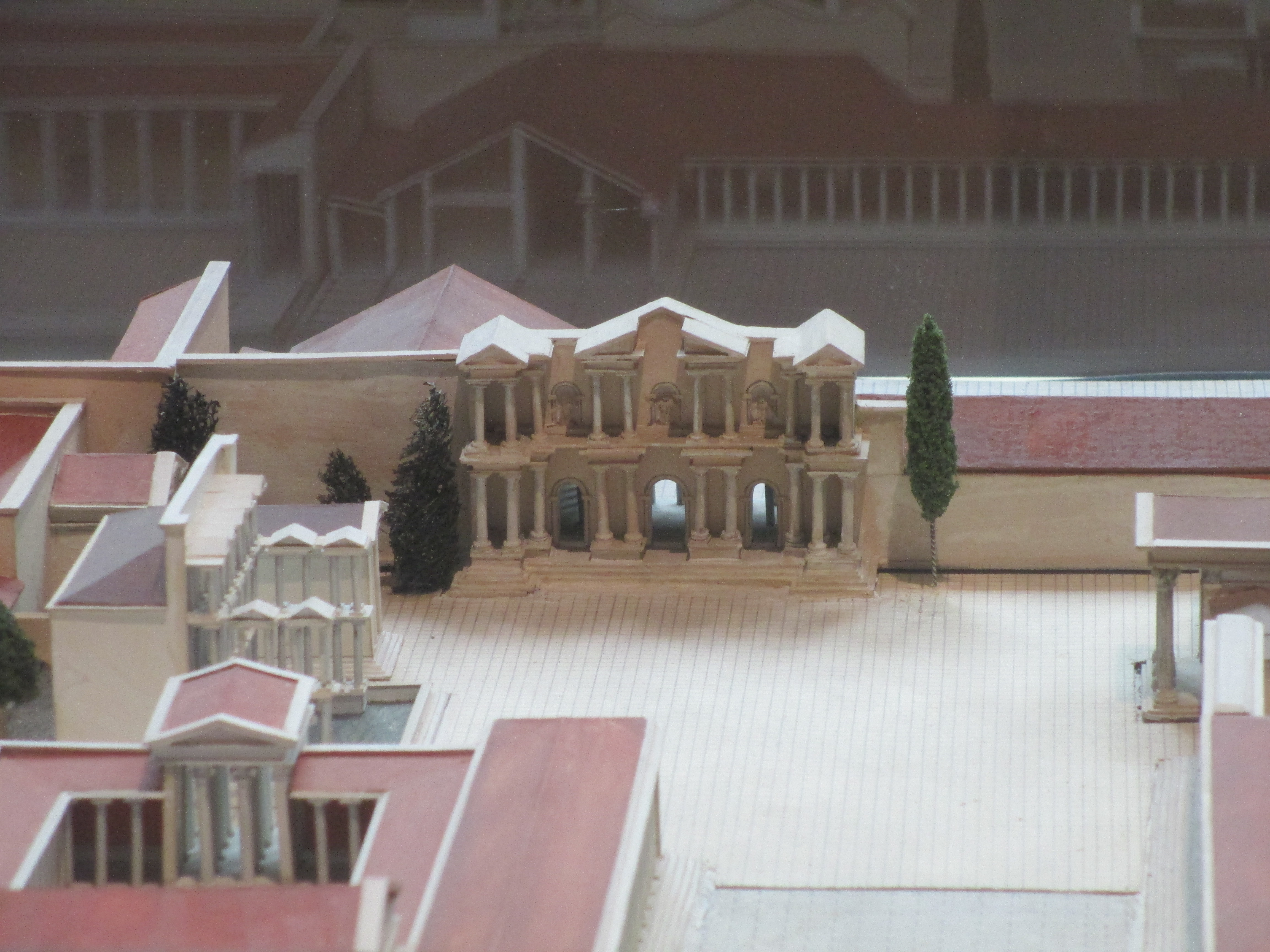 דגם של שער השוק של מילטוס